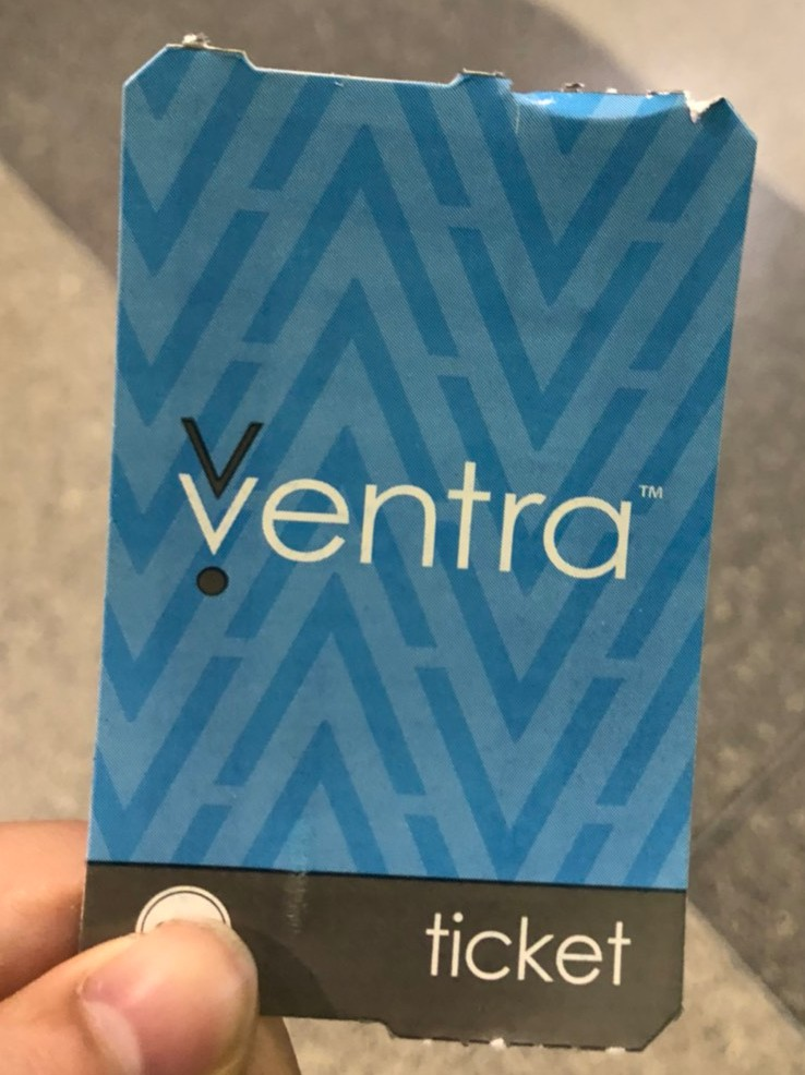 使い捨てのVentra。